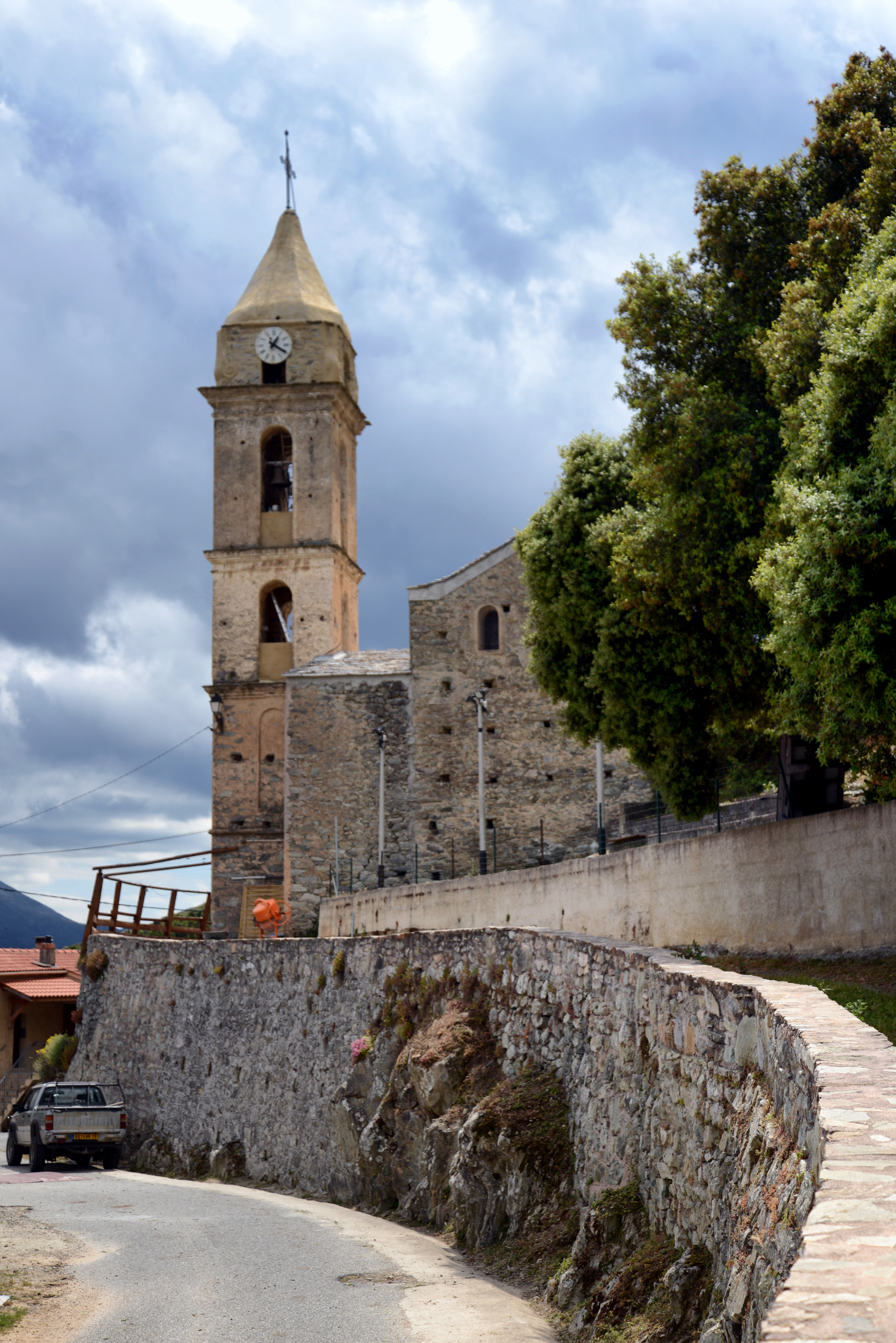 Prato-di-Giovellina (Corse) - Église paroissiale de l'Annonciation